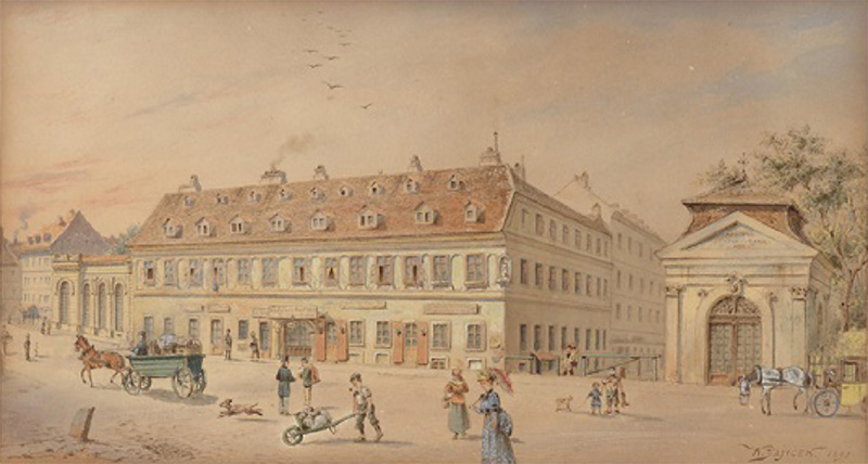 Das Gasthaus Zeisig in der Burggasse (Gasthaus zum großen Zeisig in der Wiener Burggasse). Aquarell auf Papier